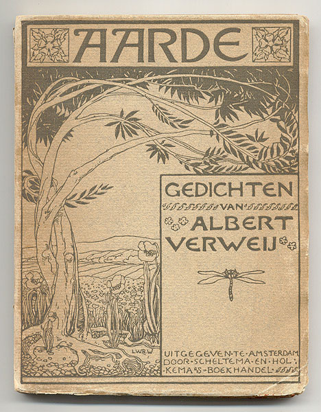 Boekomslag: Aarde. 1e druk 1896. Auteur: A. Verweij. Bandontwerp: L.W.R. Wenckebach. Uitgeverij: Scheltema & Holkema